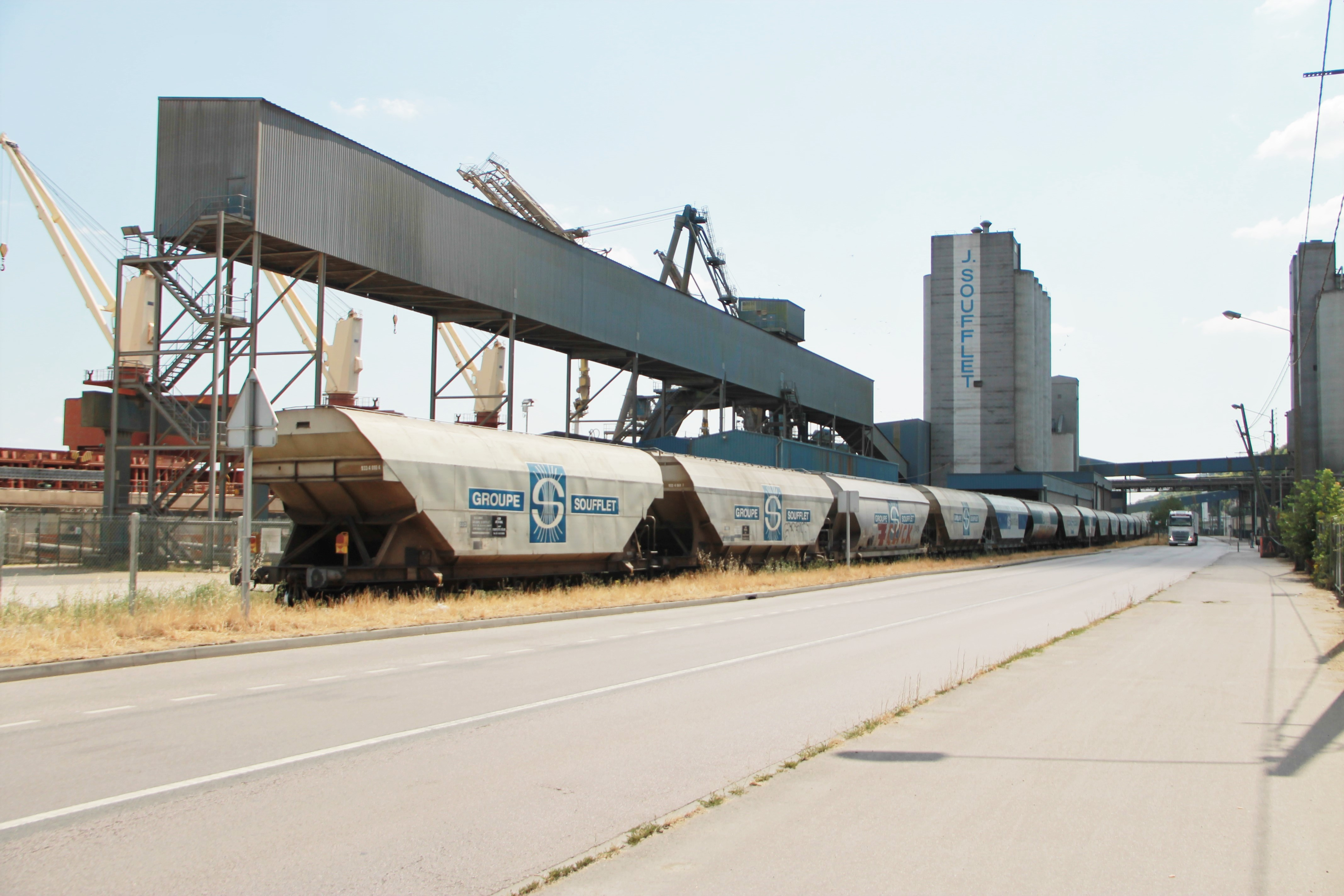 Site des moulins Soufflet à Canteleu (rive droite du port de Rouen)